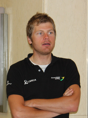 Utsunomiya 20/Oct/2012